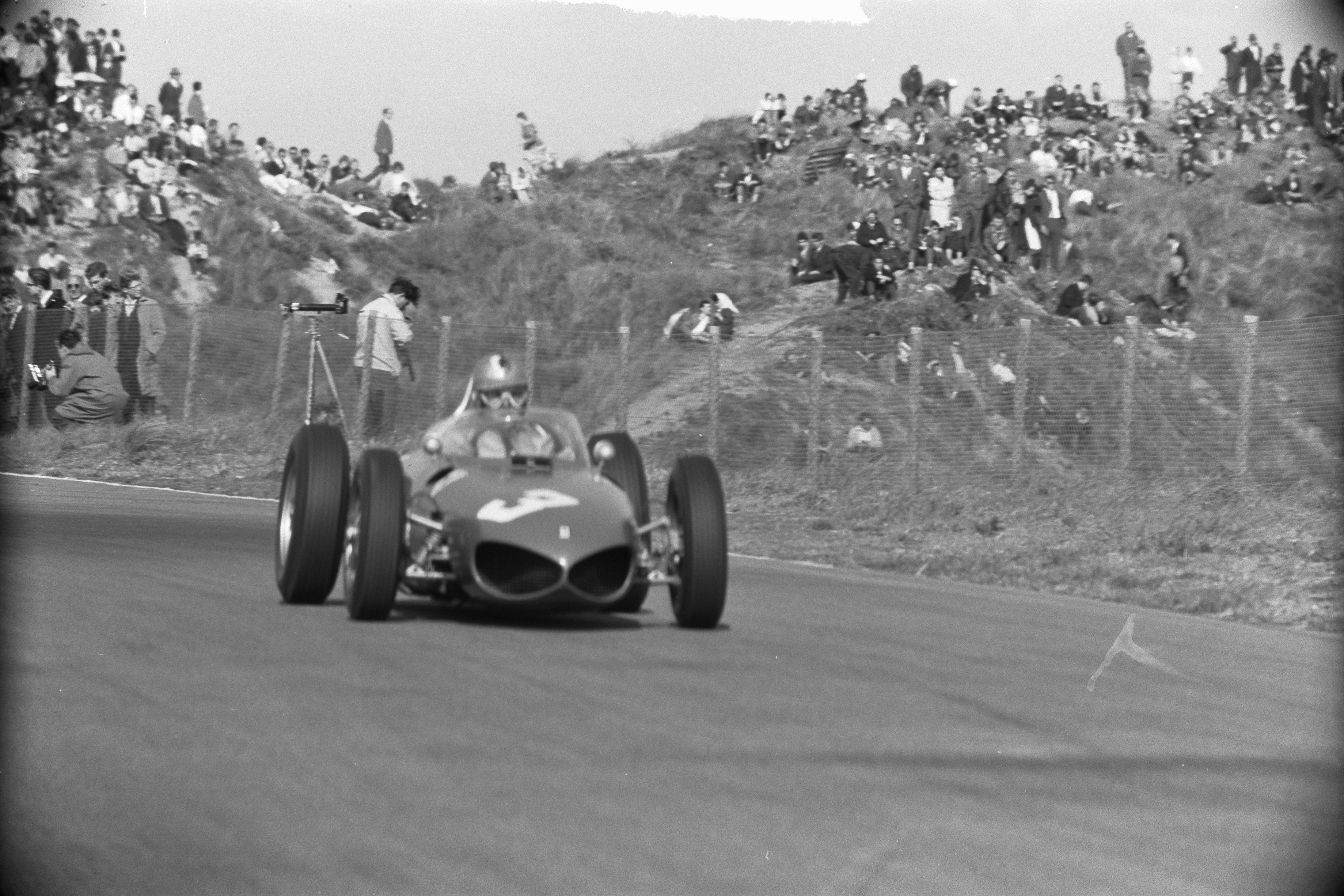 Grand Prix te Zandvoort. Wolfgang Graf Berge von Trips in zijn Ferrari (hij wint de wedstrijd).